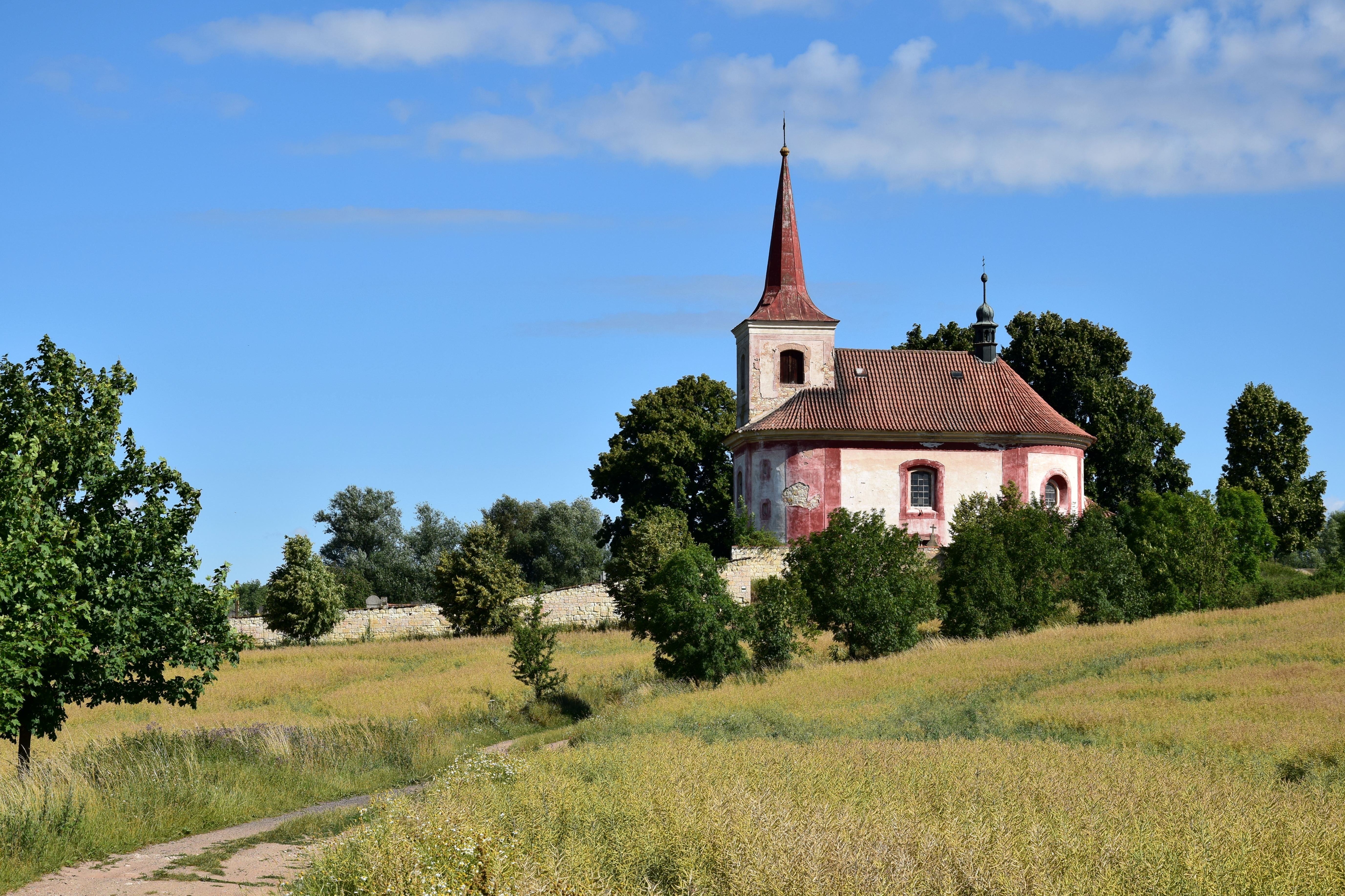 Kostel svatého Gotharda od jihu